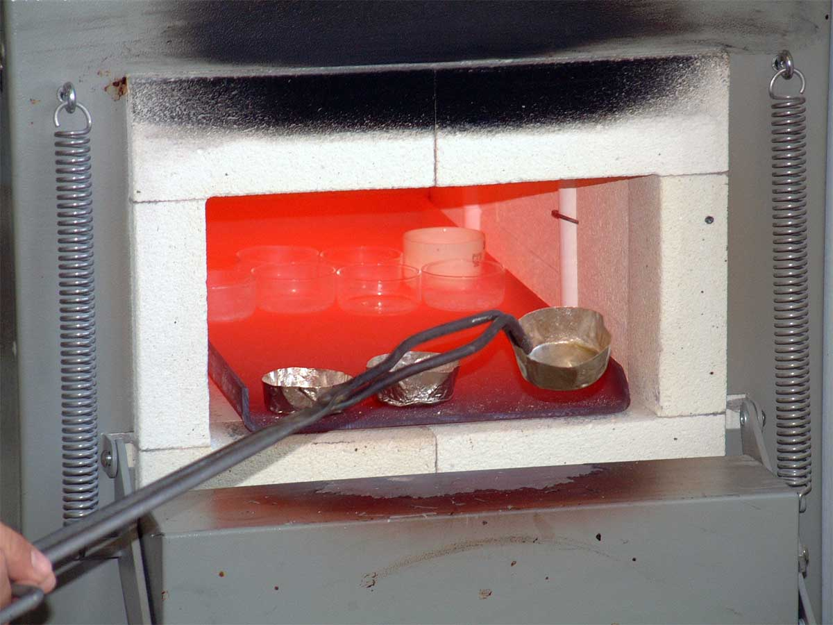 Beschreibung: Muffelofen zur Mineralstoffbestimmung Fotograf: Benutzer:BMK 2006 Please send reference and voucher copy to BMK(at)clever.ms Bitte Quellenangabe und Beleg an BMK(at)clever.ms